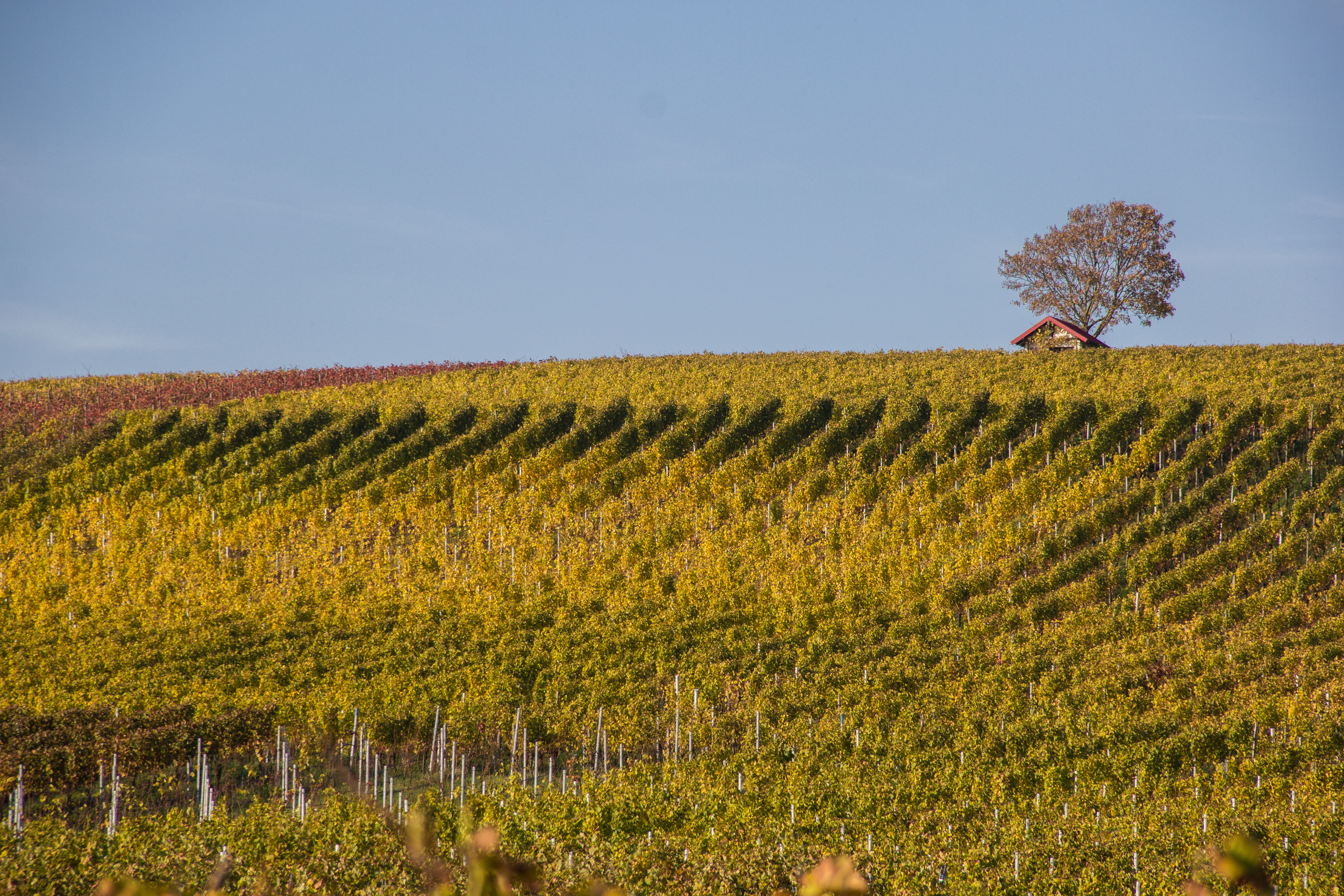 Weininsel, Main, Sommerach, Nordheim, LSG Volkacher Mainschleife